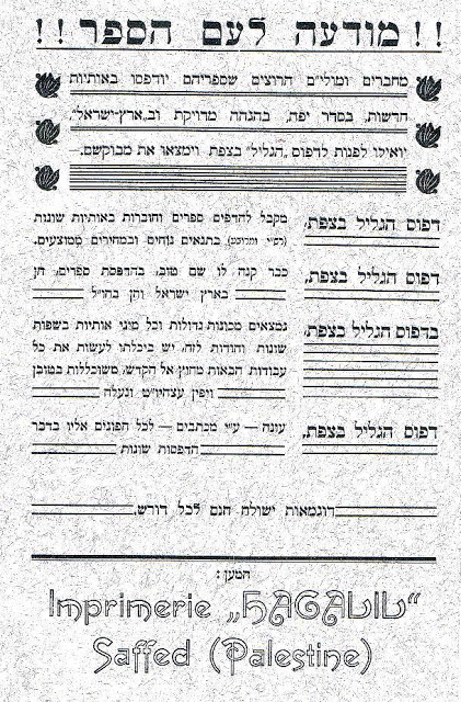 מודעת פרסומת של בית הדפוס "הגליל" בצפת 1914-1925